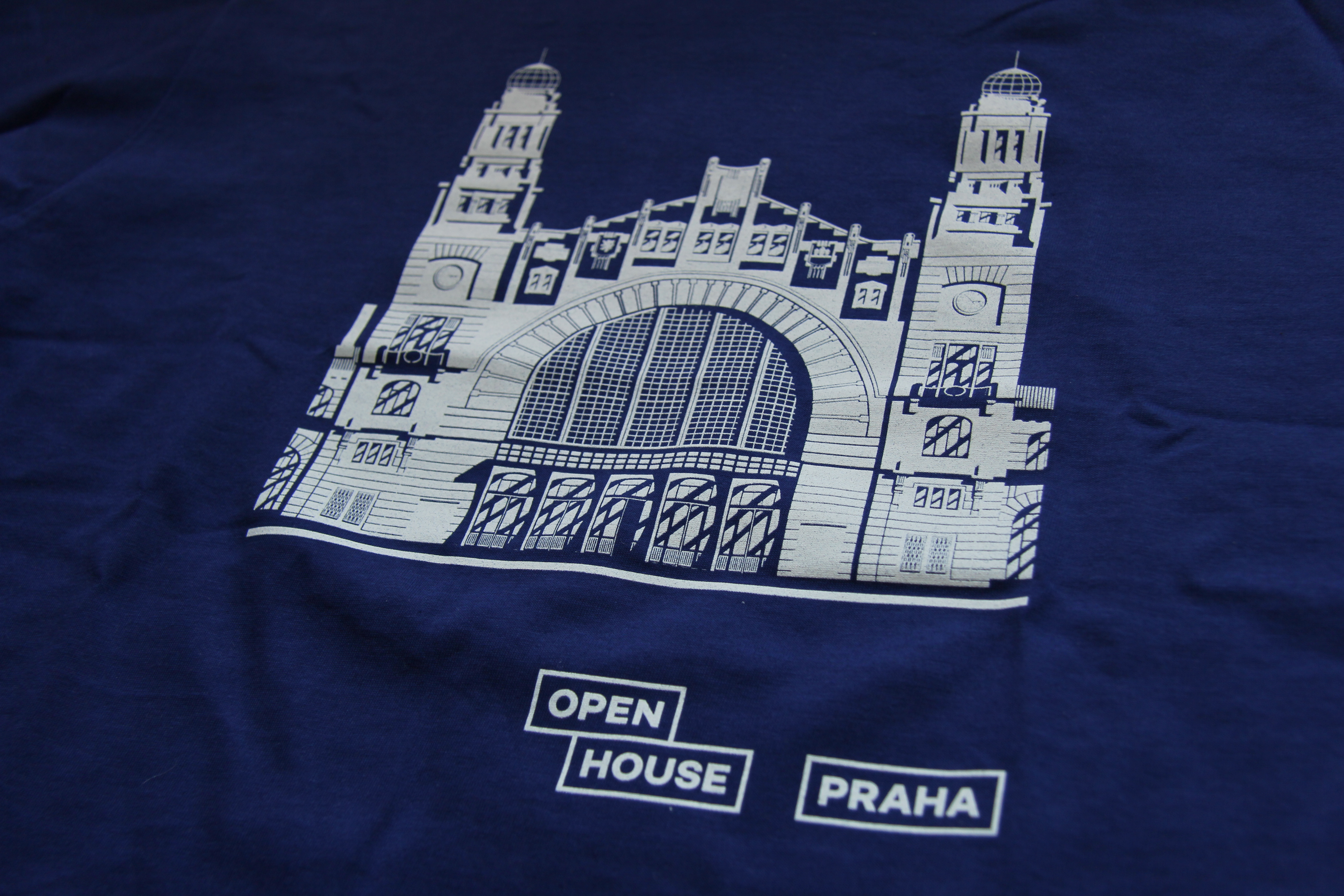 Trička dobrovolníků festivalu Open House Praha (2018)